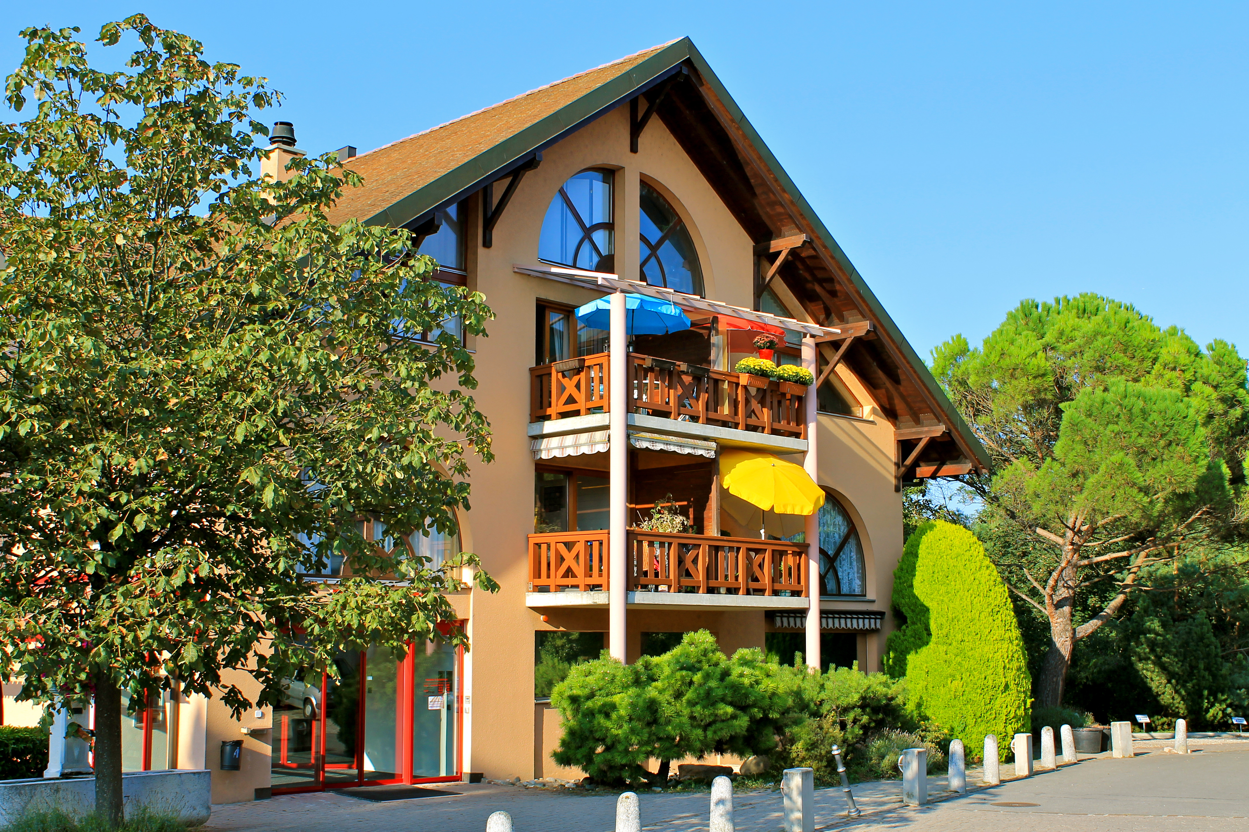 Tannay